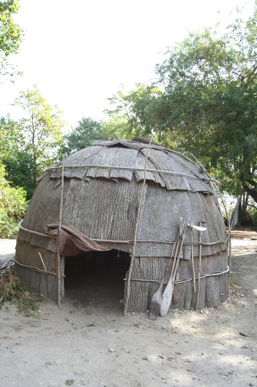 Indianische Borkenhütte nahe Plymouth (Massachusetts)